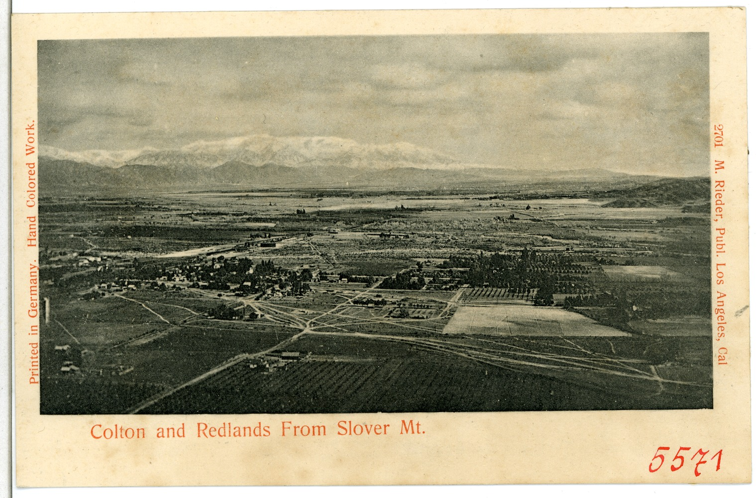 Colton; Colton and Redlands From Slover Mt. This postcard is from publisher Brück & Sohn in Meißen ( postcard has a unique number 05571 and is available in a higher resolution at the publisher. This images was uploaded in a cooperation project between Wikipedians and the publisher.